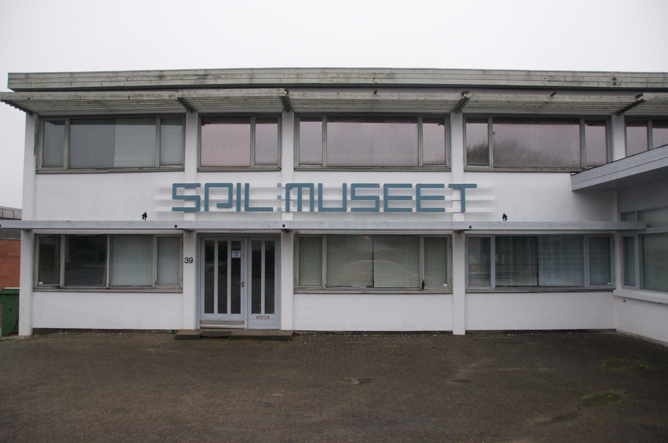 Spilmuseet startede på Nygade 39, Ikast i 2008 efter at have ligget i Sporup i 8 år. Museet lukkede ved udgangen af 2012 pga. manglende offentlig støtte.